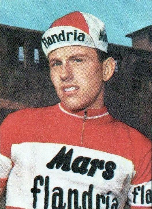 Joop Zoetemelk en 1971, 'Sprint 71', Panini figurina n°57.